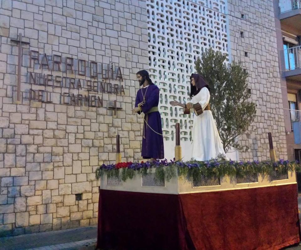 Paso de misterio de Nuestro Padre Jesús Cautivo en el puente del Cedrón en el año 2015.